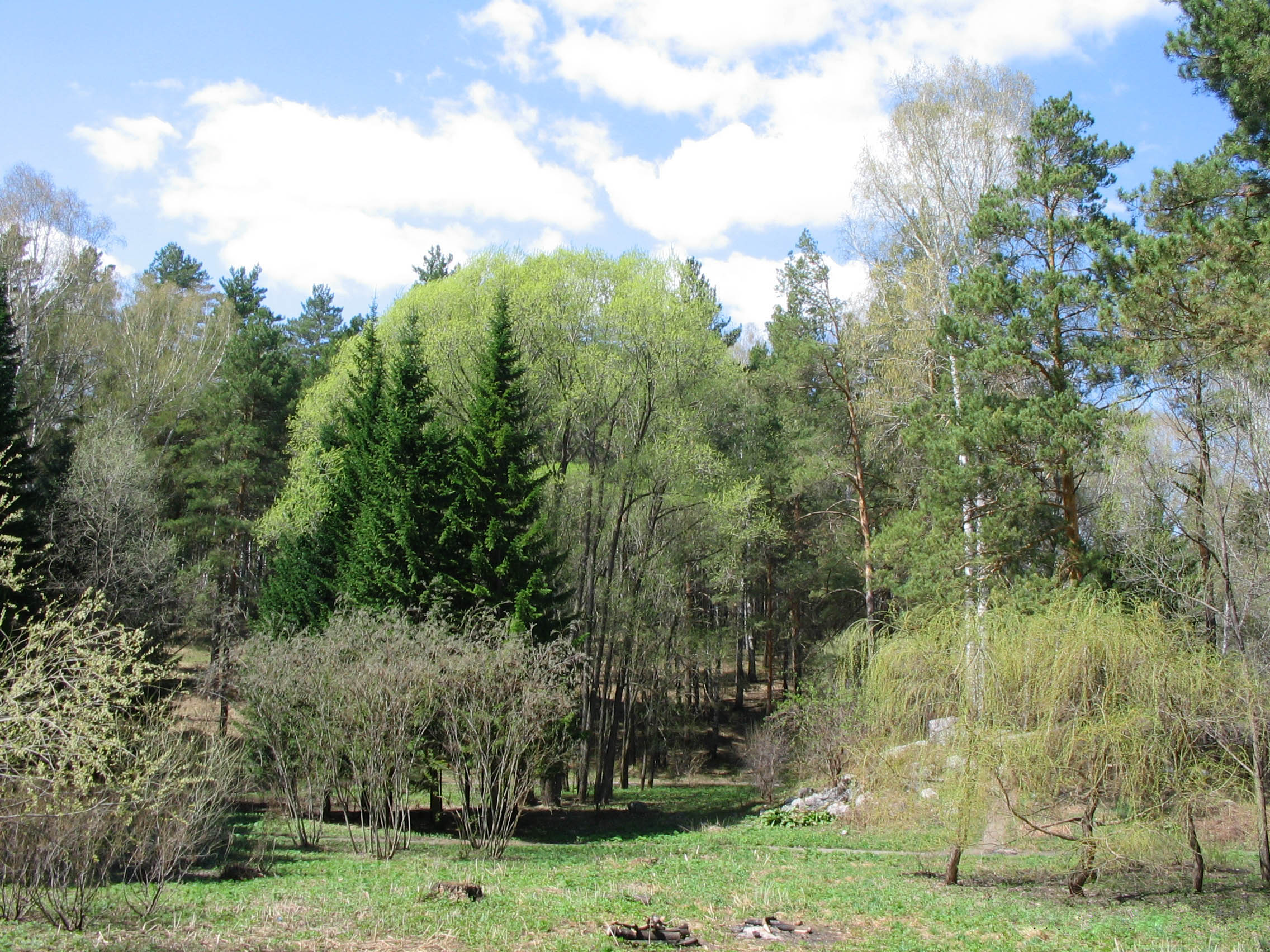 Центральный сибирский ботанический сад. Панорама летом.